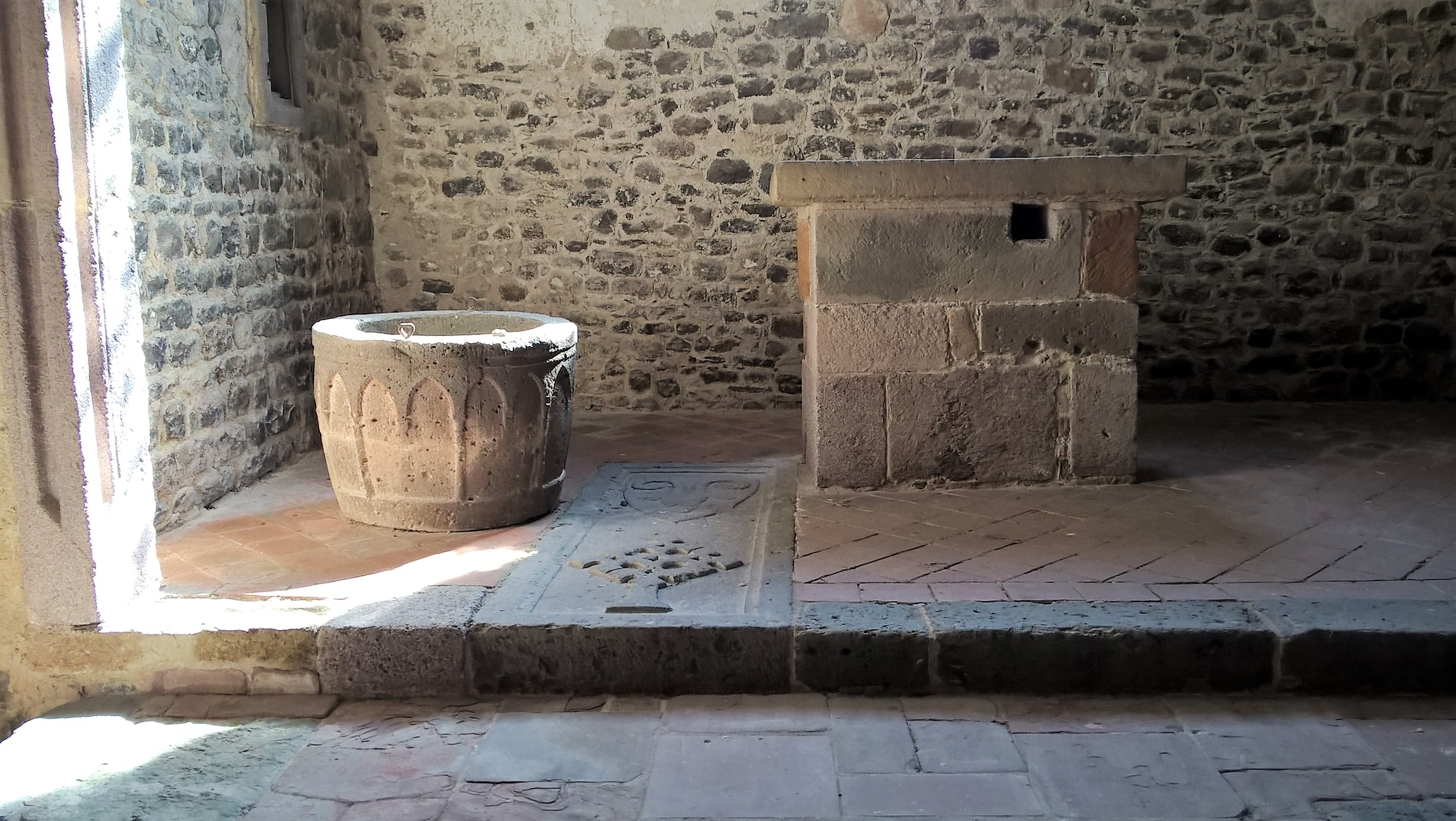 Kloster Schiffenberg, Landkreis Gießen, Hessen, Deutschland